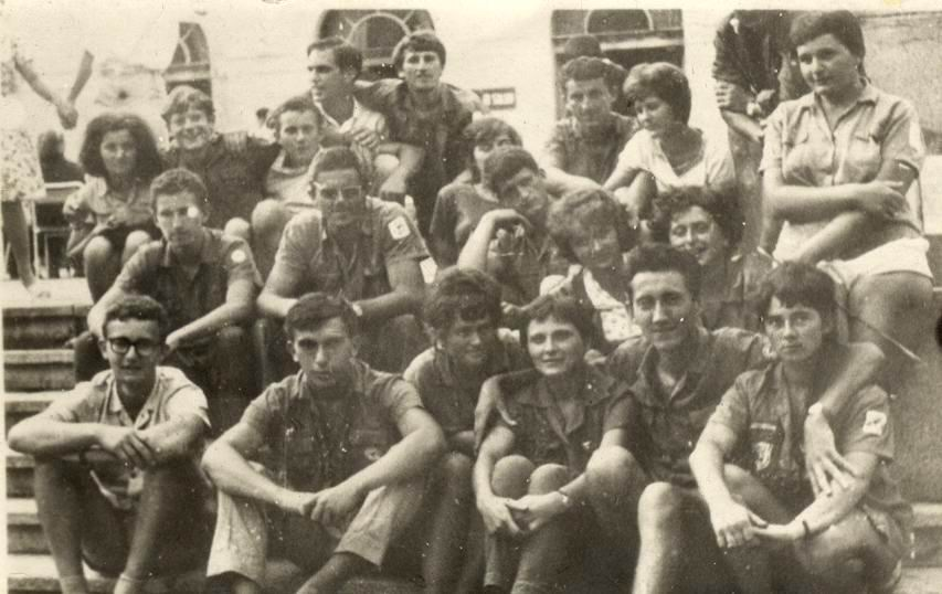 Бригада "Јован Поповић", четврта чета на радној акцији изградња пута од Вукове родне куће до Манастира тронођа, 4 километра, јули 1964. Слика из моје приватне колекције, предајем у јавно власништво.